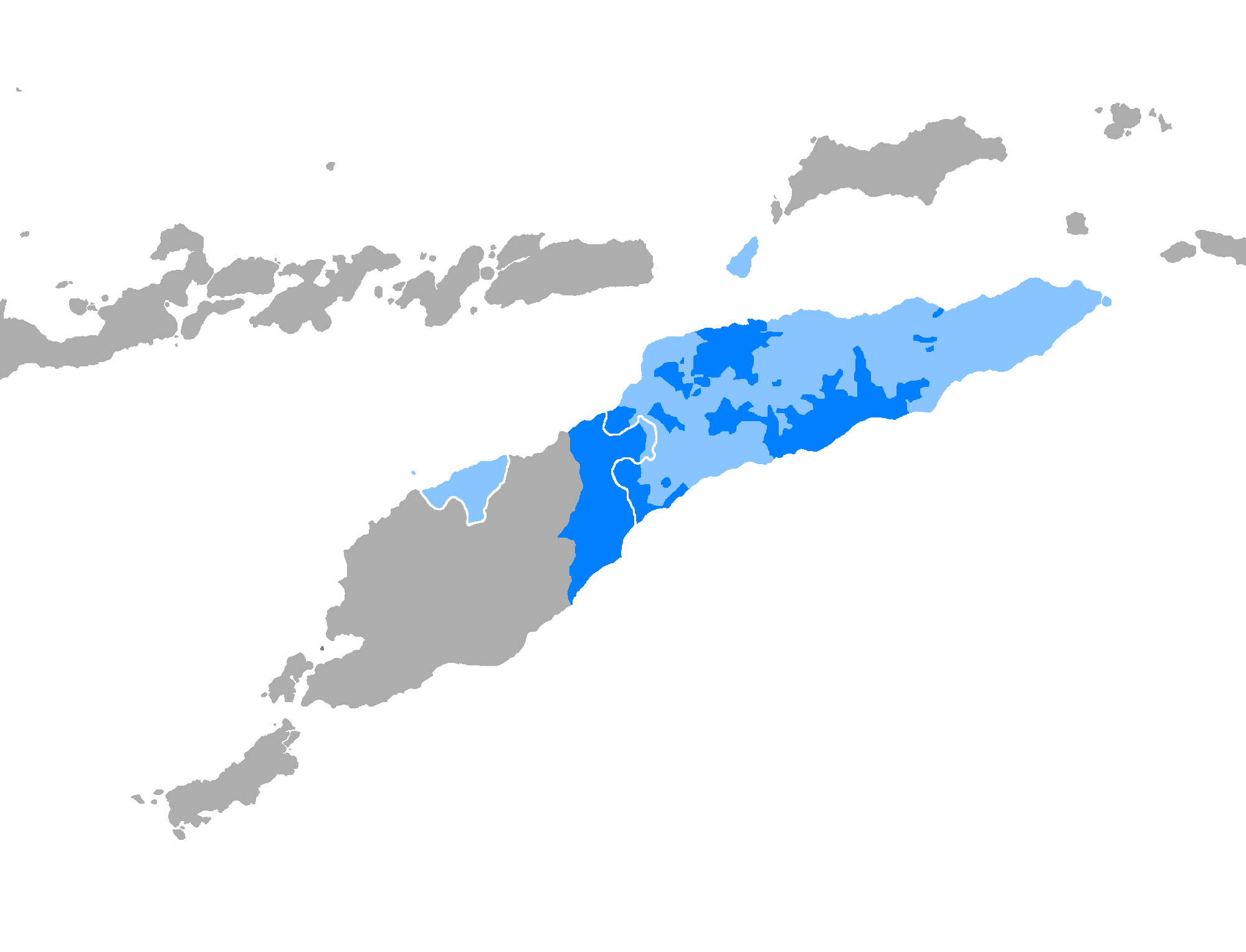 Idioma tetun.